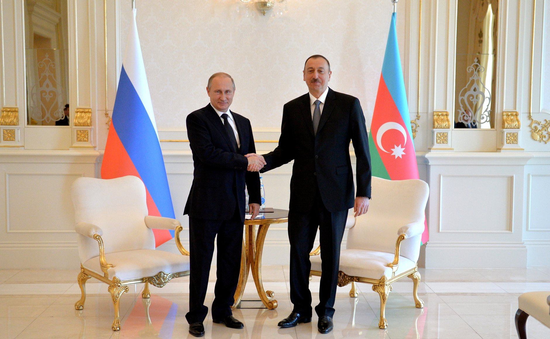 Встреча Президента России Владимира Путина с Президентом Азербайджана Ильхамом Алиевым